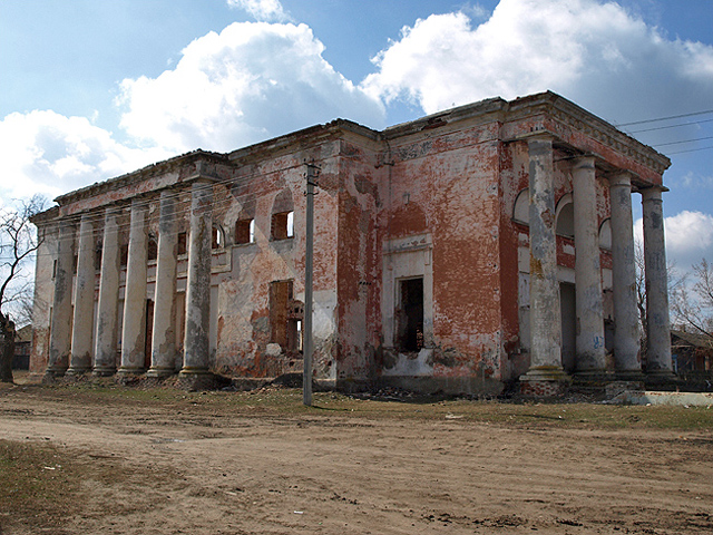 Ruinierte katholische Pfarrkirche in Sowetskoje (ehem. Mariental), Russland.